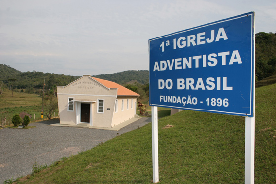 Foto da primeira igreja adventista fundada no Brasil. Pode ser encontrada no Blog de Michelson BOrges sobre a chegada do Adventistmo no Brasil. A imagem pode ser usada livremente, desde que não para fins comerciais.